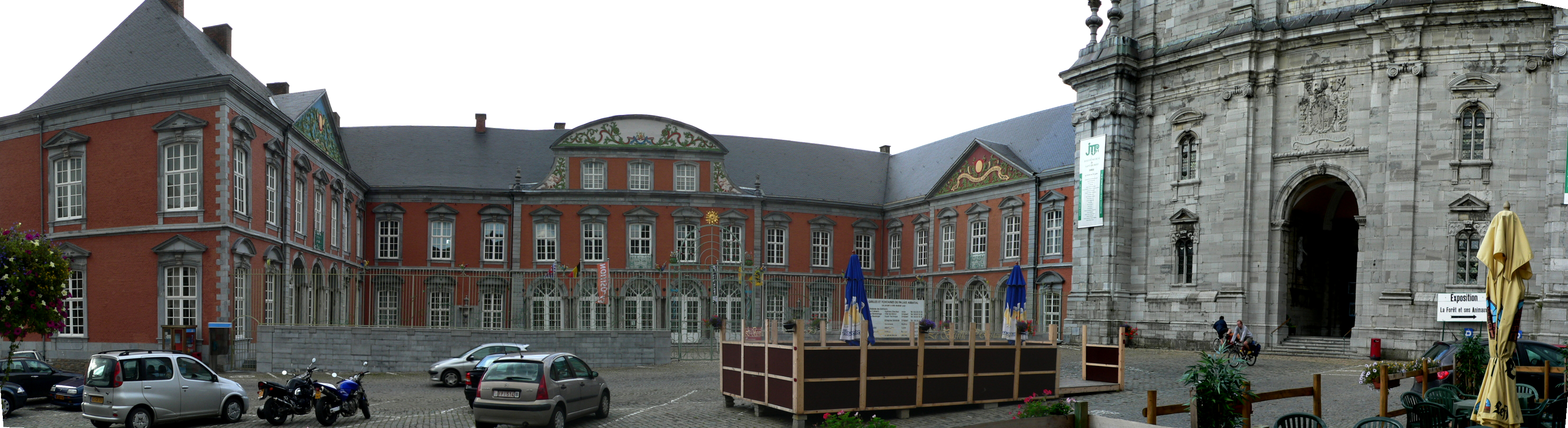 Le "complexe abbatial" de Saint-Hubert (palais abbatial (intérieur et extérieur), cour d'honneur, fontaine du XIX e s., façades et toitures des autres bâtiments et des locaux de l'athénée sauf l'ancienne chapelle) (M) et ensemble des constructions avec les cours intérieures (S) Place de l'Abbaye B-6870 Saint-Hubert Provinz: Luxemburg Bezirk: Neufchâteau